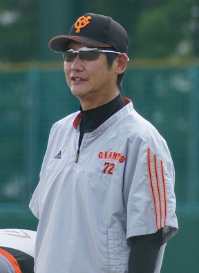 Giants_awano_72